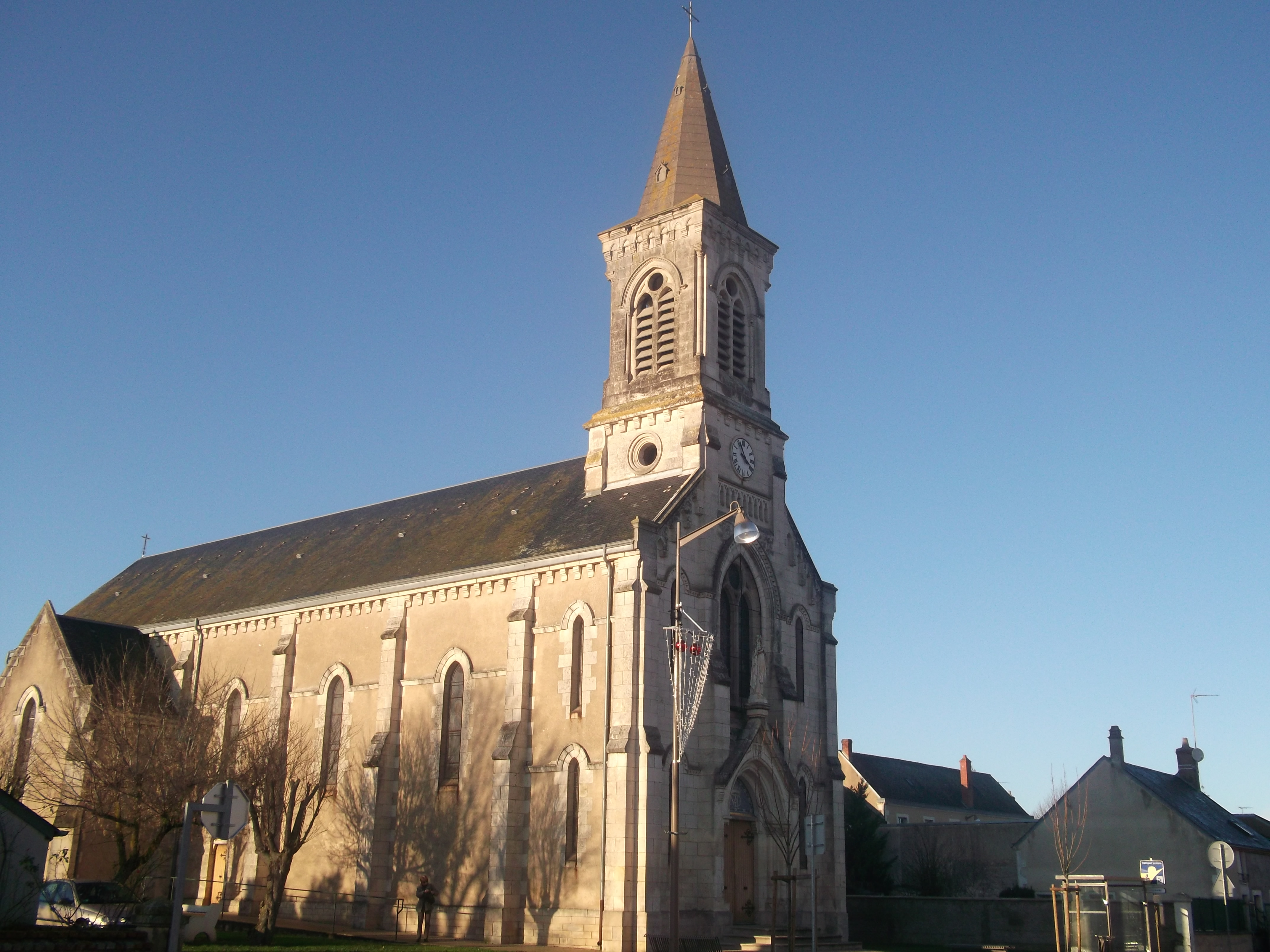 Eglise Notre-Dame-de-Lourdes de Saintes-Lizaigne